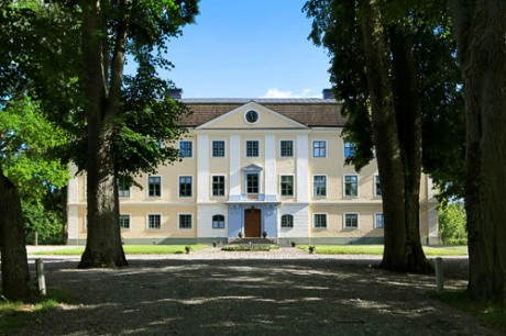 Sonstorp Herrgård